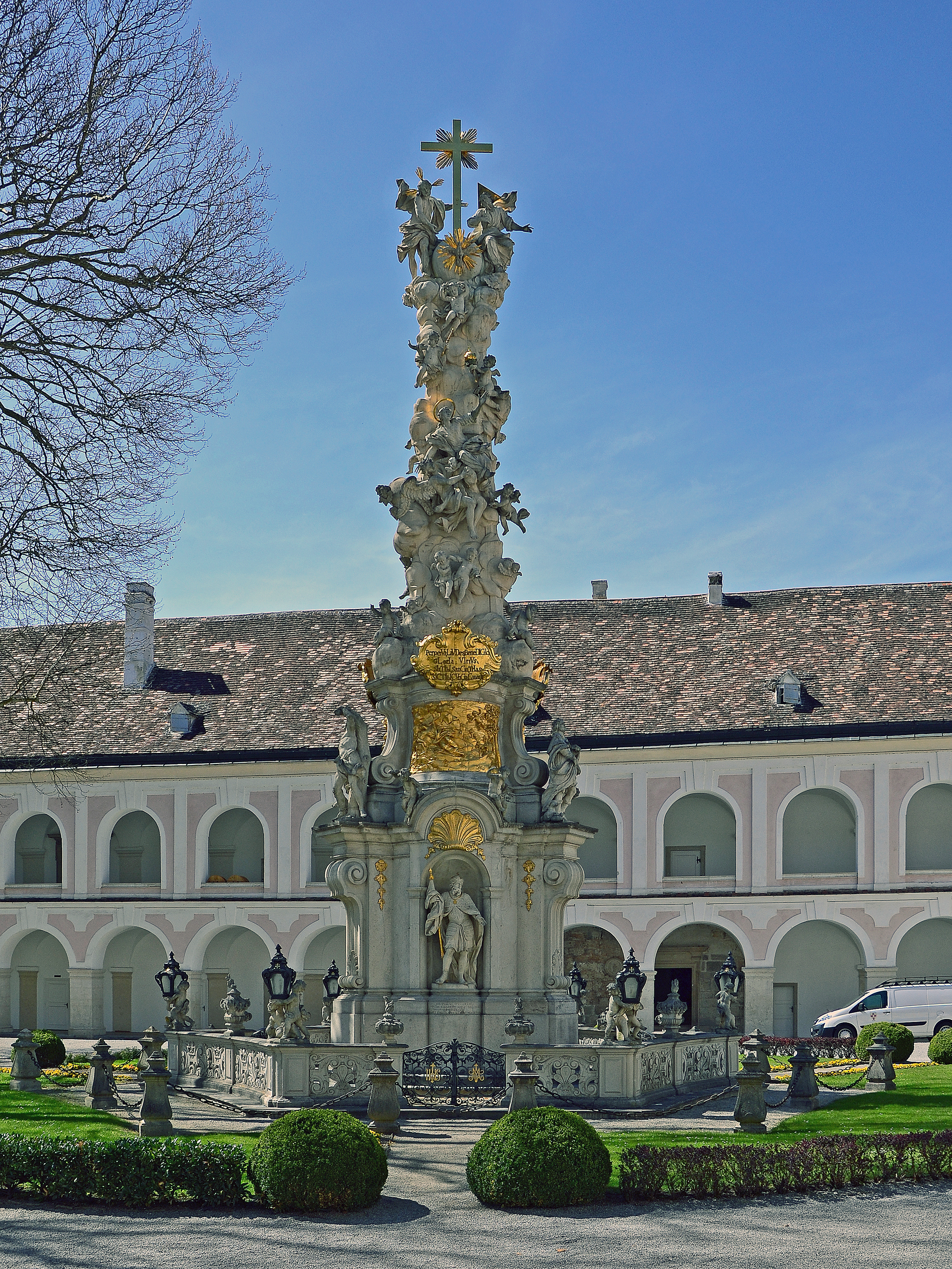 Barocksäule Stift Heiligenkreuz im Wienerwald